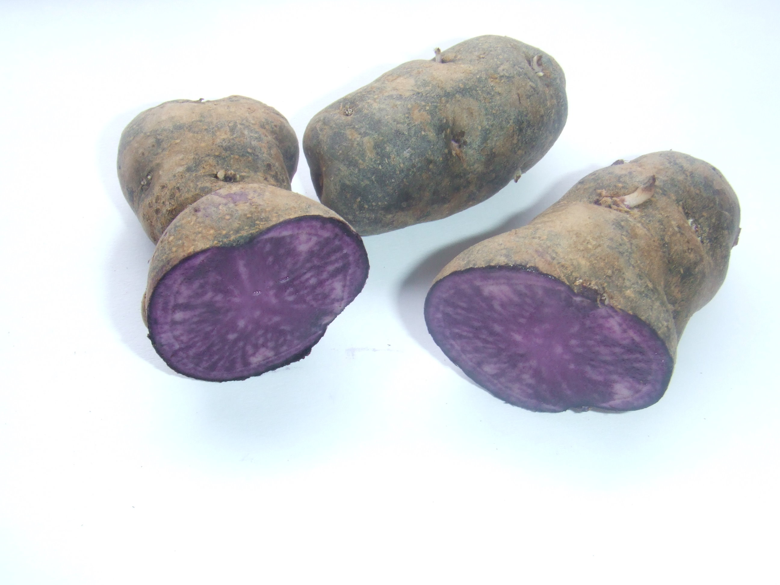 Vittelotte noir (Zwarte truffelaardappel), gekocht op de Binnenrotte-markt in Rotterdam